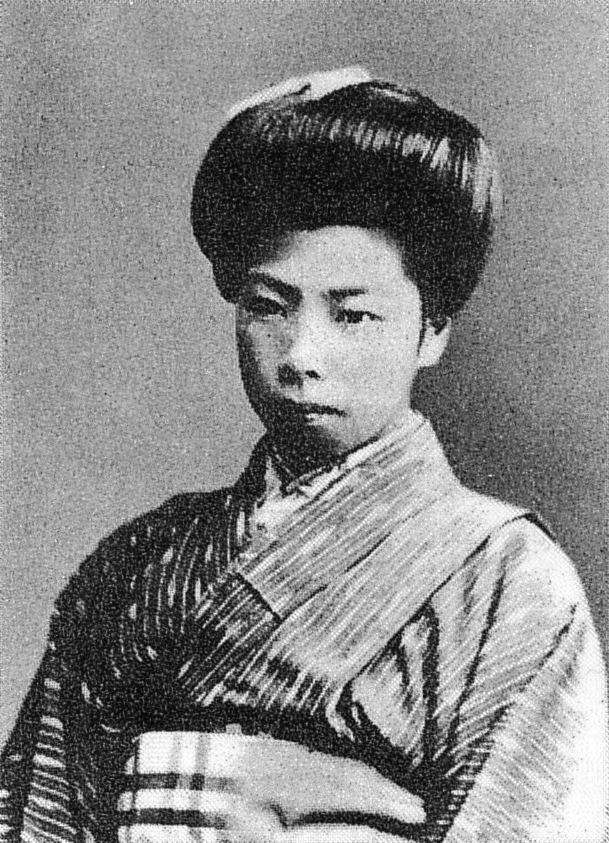 内村鑑三の夭折した娘ルツ子